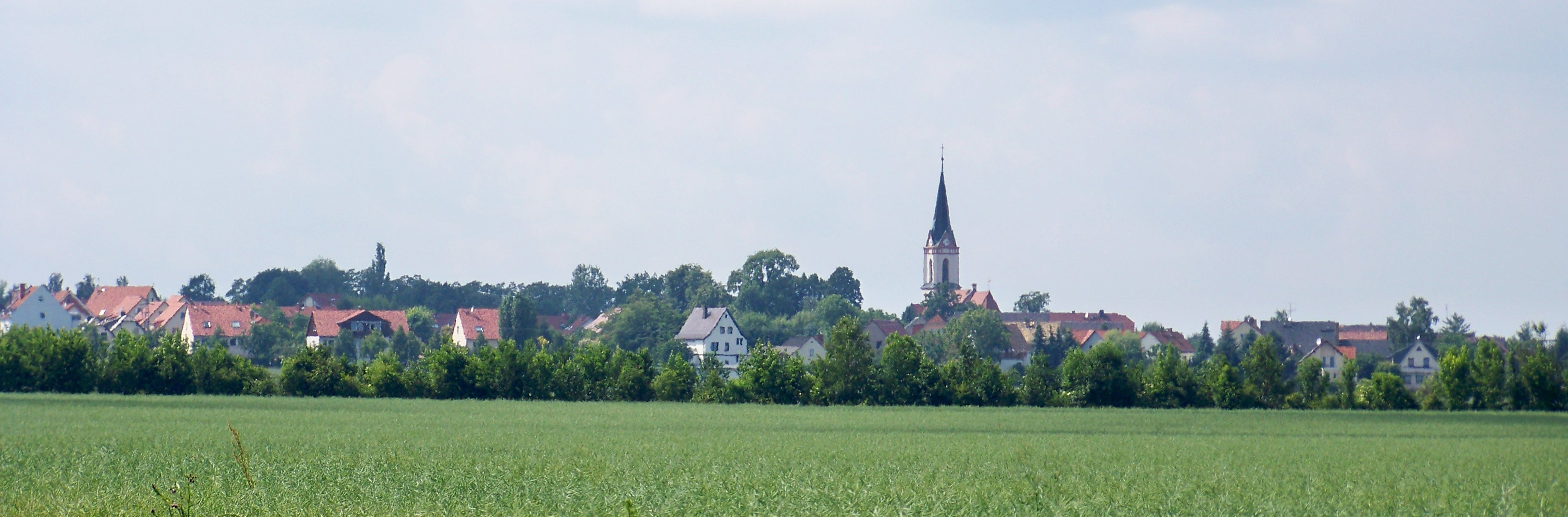 Fuchshain/Sachsen (Stadt Naunhof)